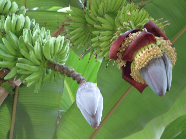 Detail: Fruchtansatz der Banane mit Blüte